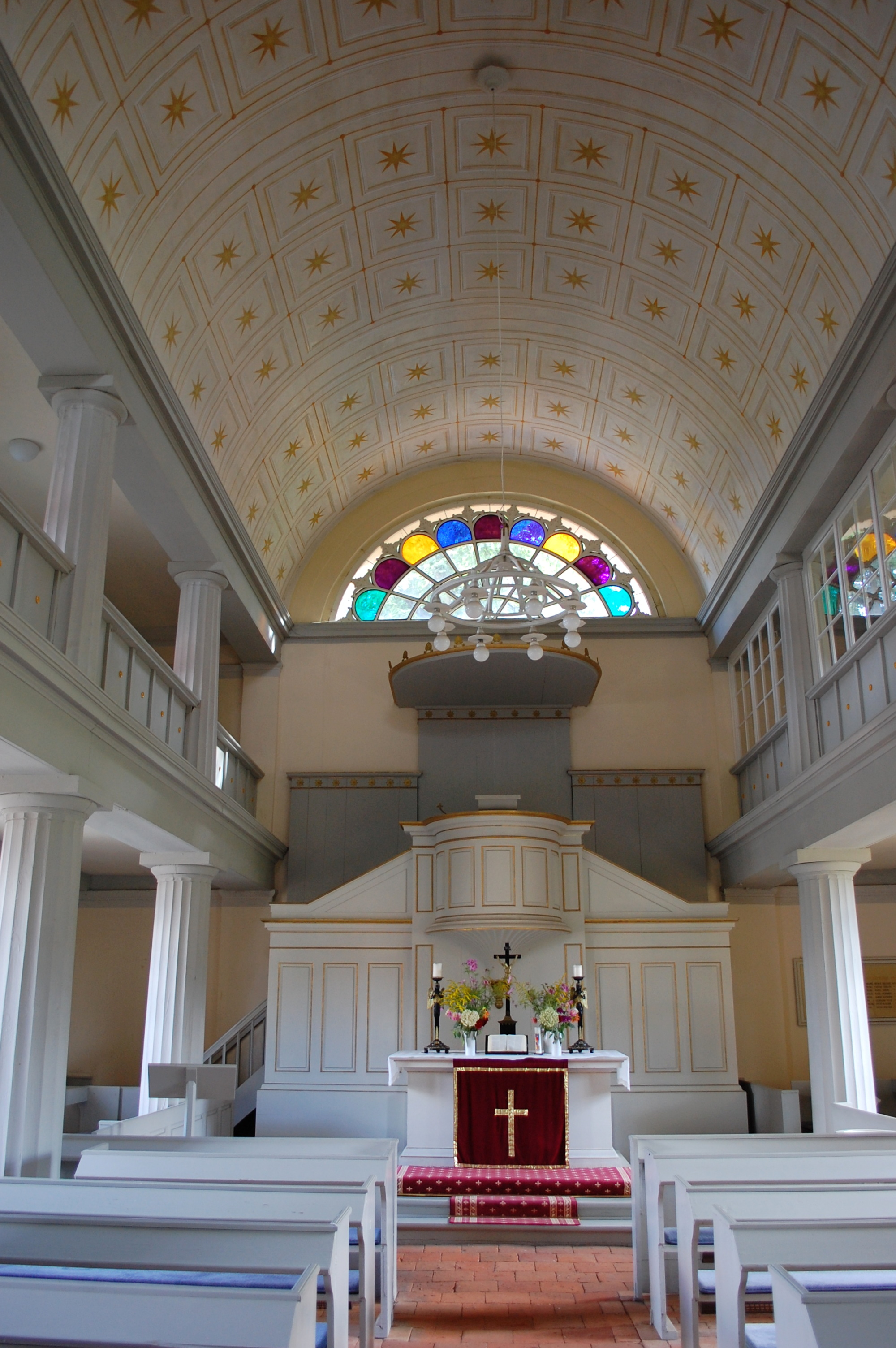 Innenraum Dorfkirchen Annenwalde